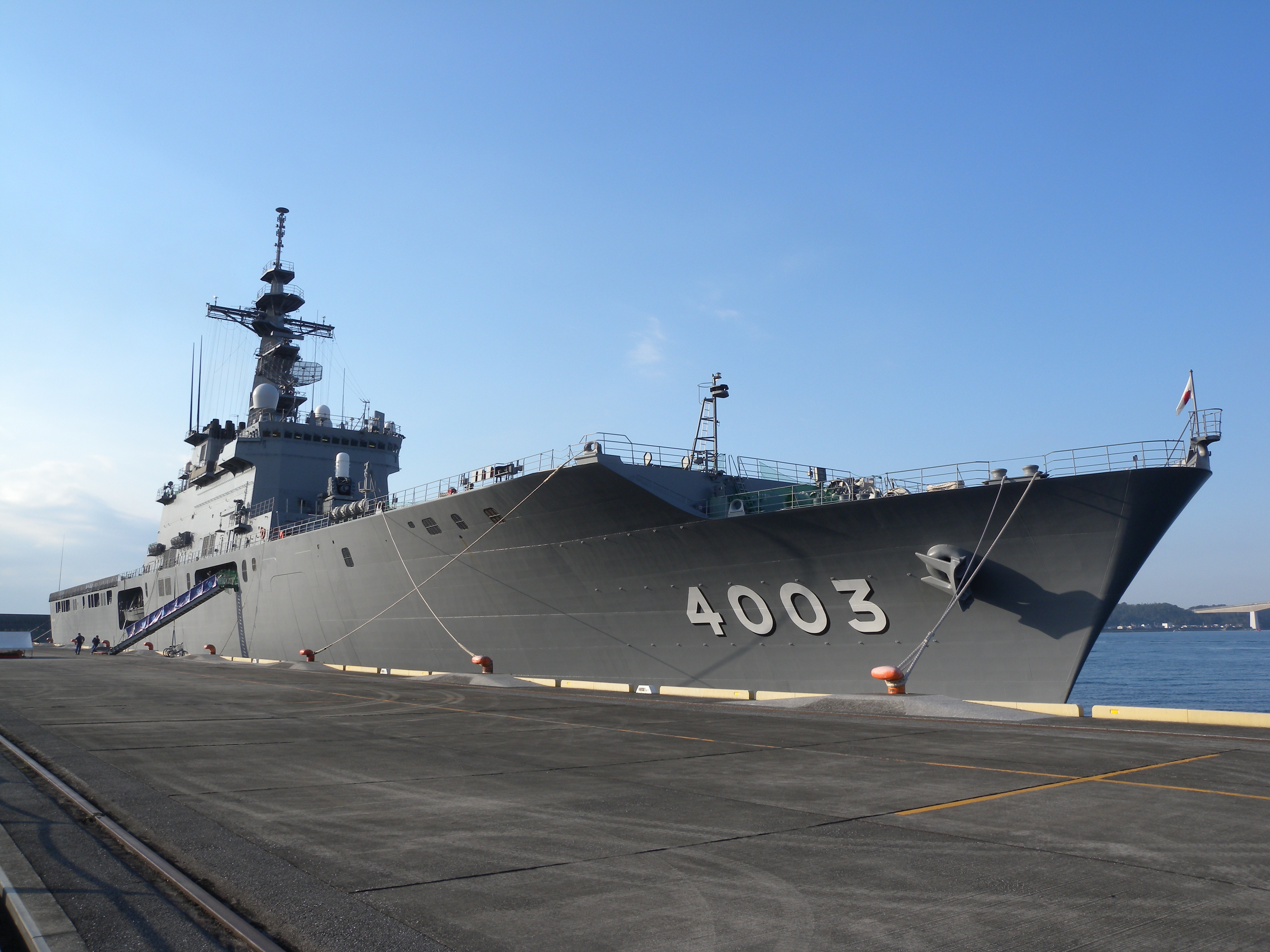 高知新港に寄港した、おおすみ型輸送艦三番艦「くにさき」。